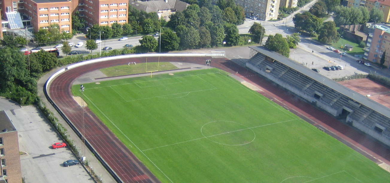 The Hästhagen sports arena in Malmö, Sweden. Photo taken from Kronprinsen